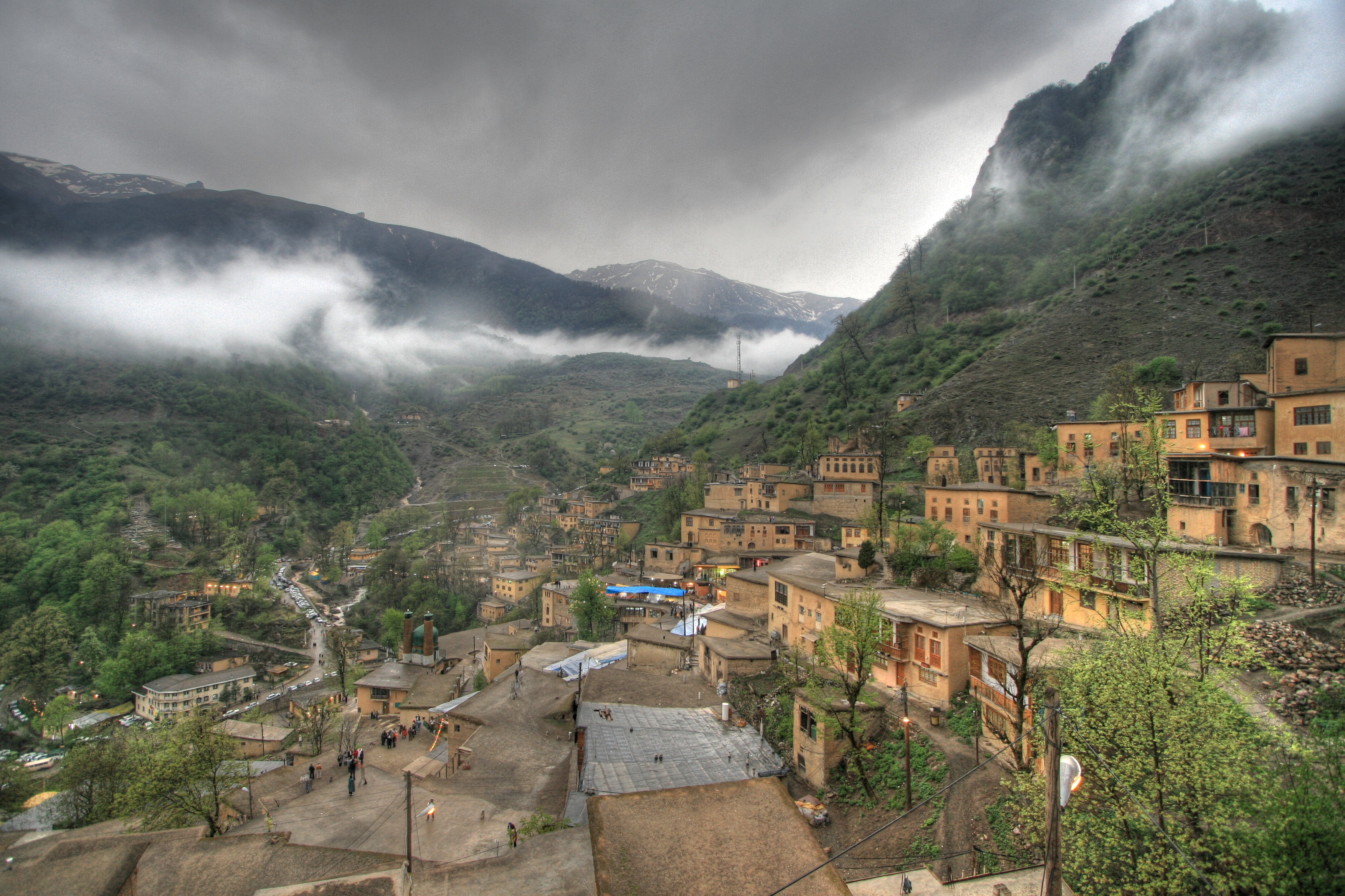 Masouleh, Iran.